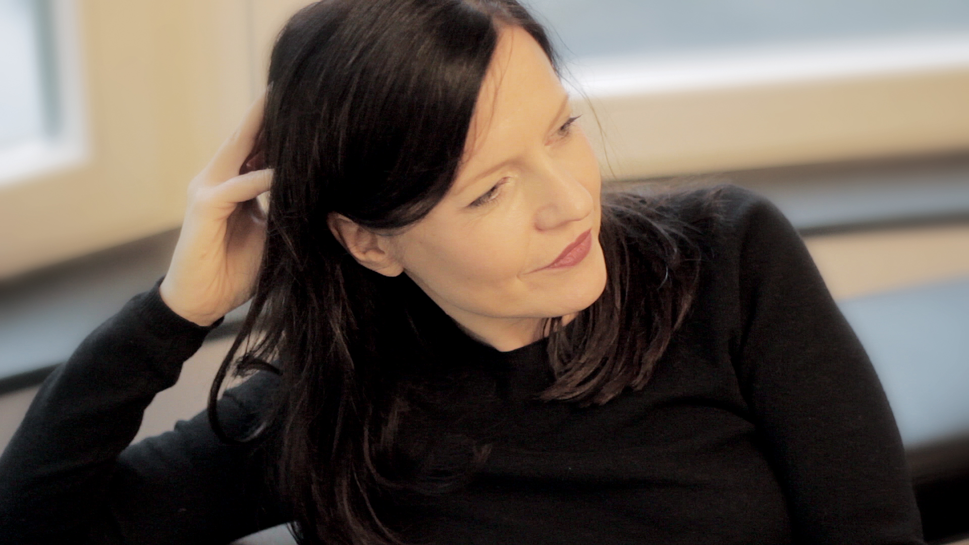 Die deutsche Pianistin Alexandra Sostmann